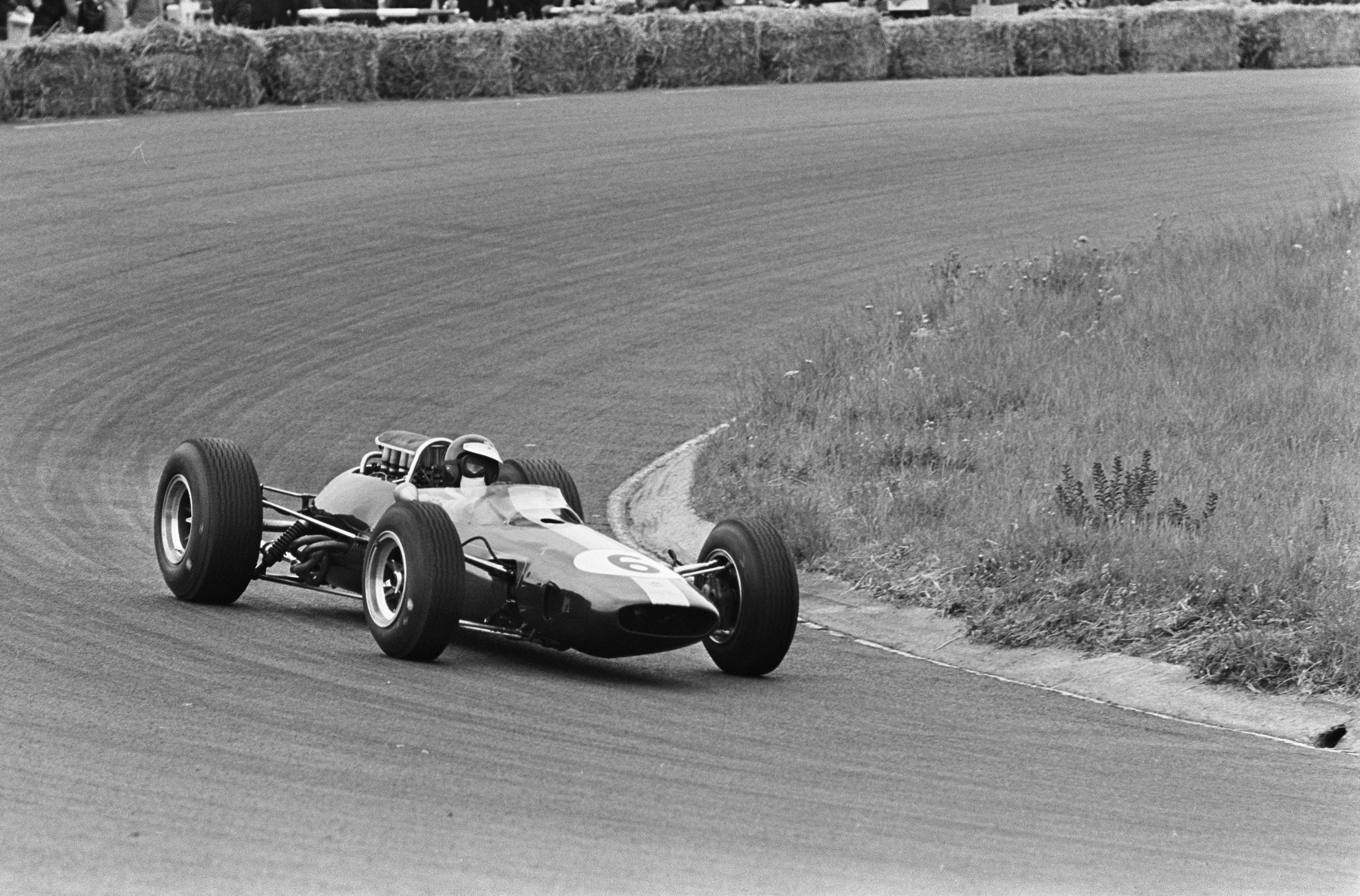 Grote Prijs van Zandvoort, Jim Clark in Lotus in actie.